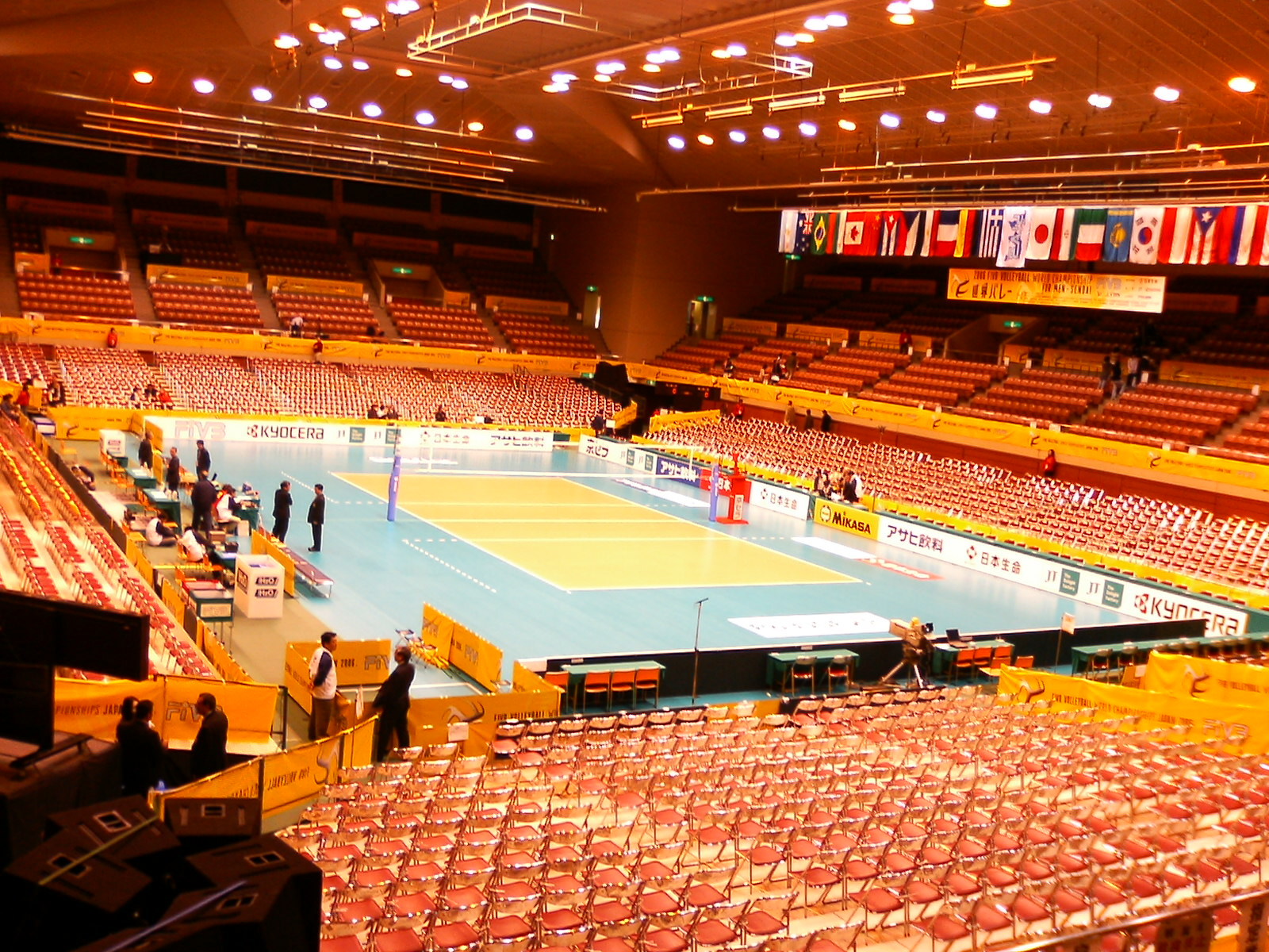 仙台市にある市営の体育館。スポーツの国際大会やコンサートなどが開催されている。